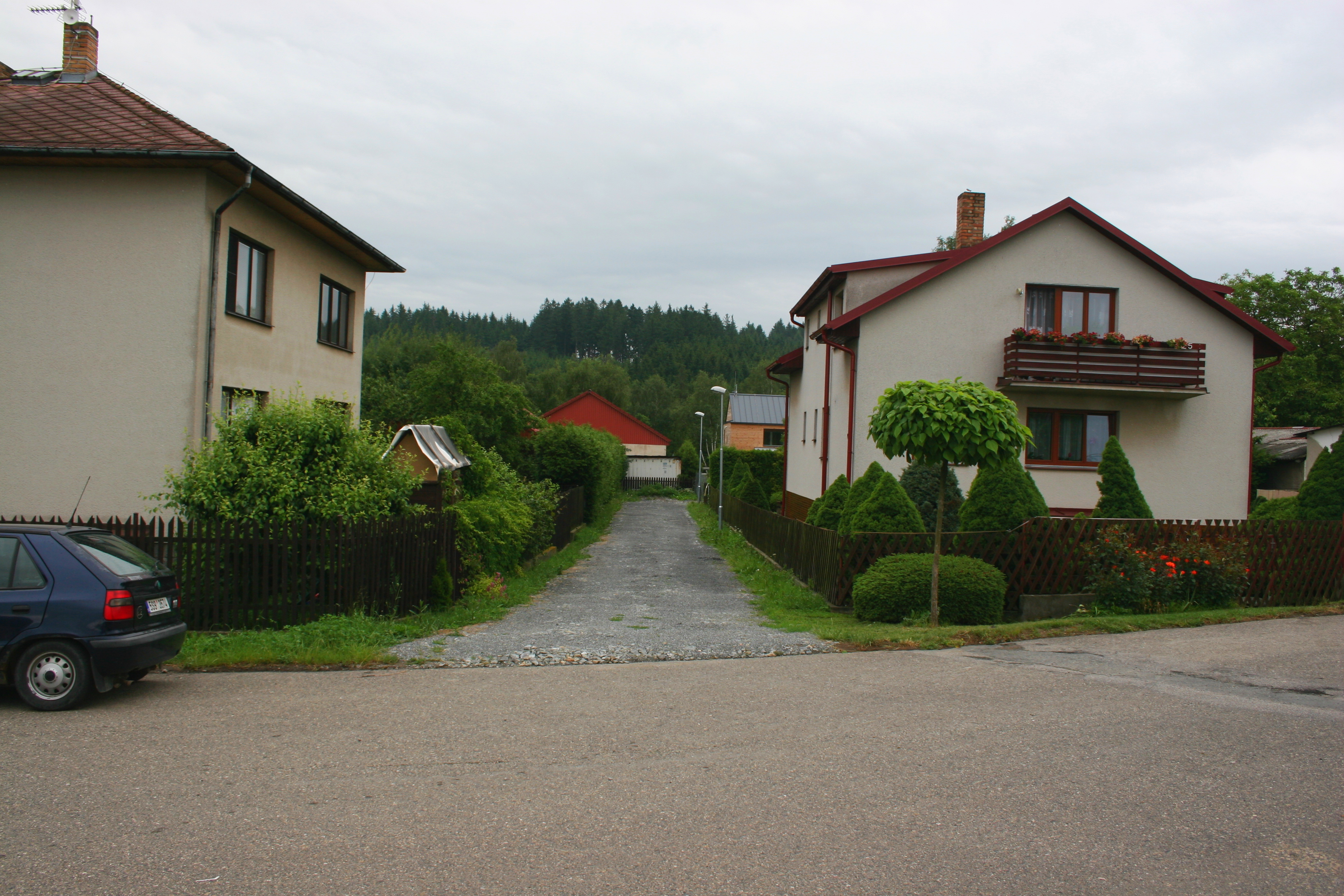 Hostišov, Česká republika.